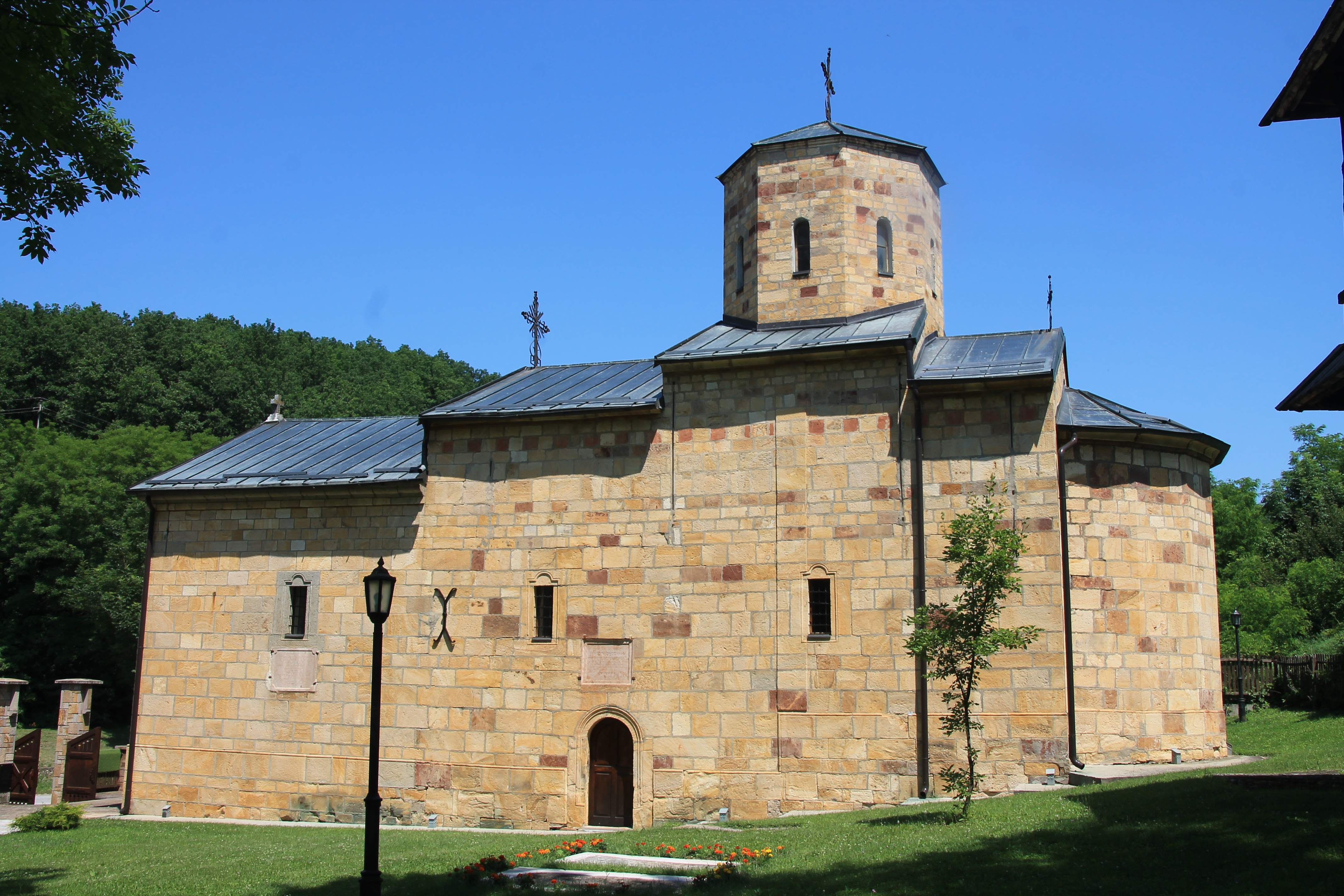 Crkva Svetog Save na Savincu